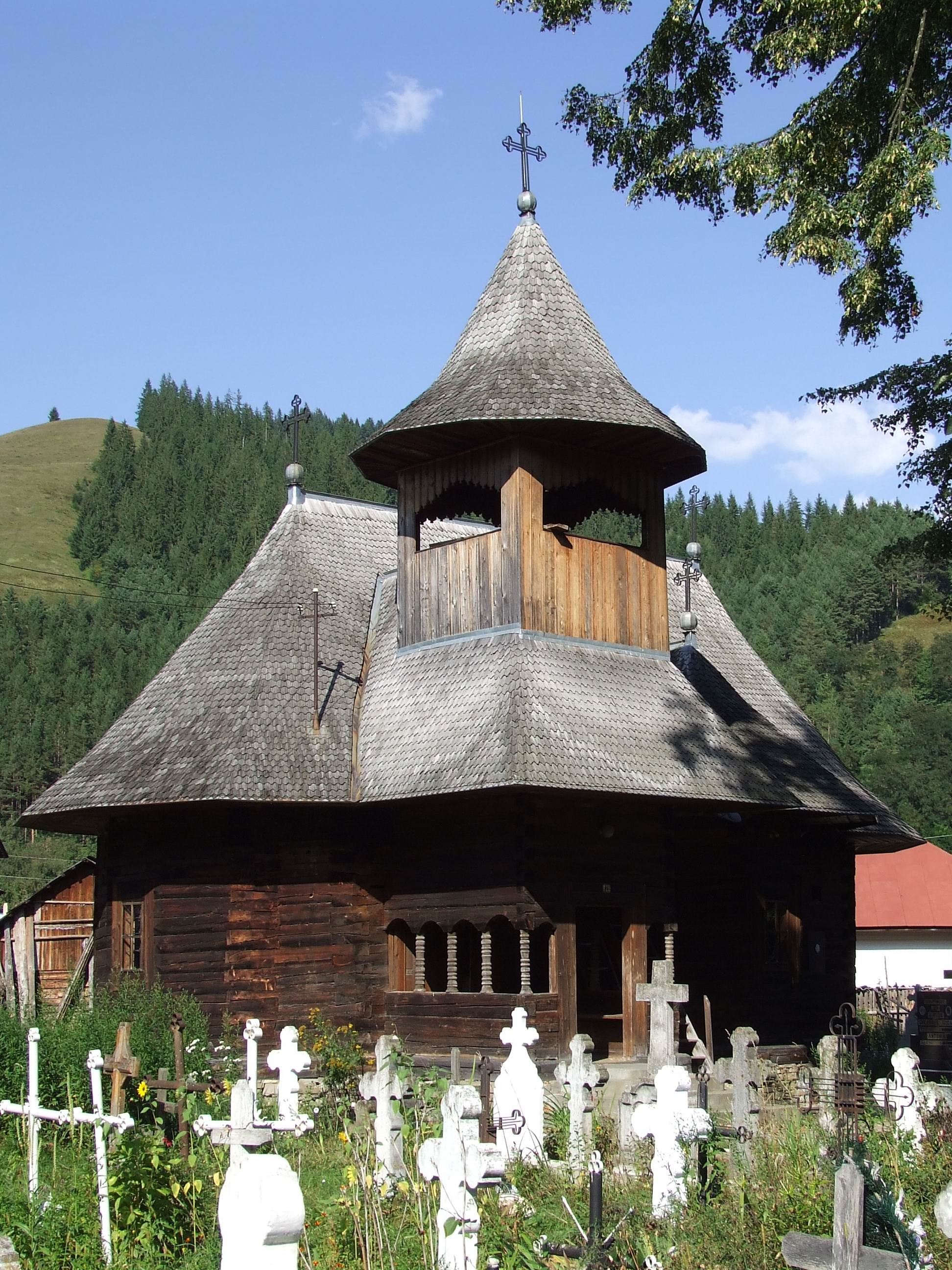 Biserica de lemn din Galu, judeţul Neamţ.